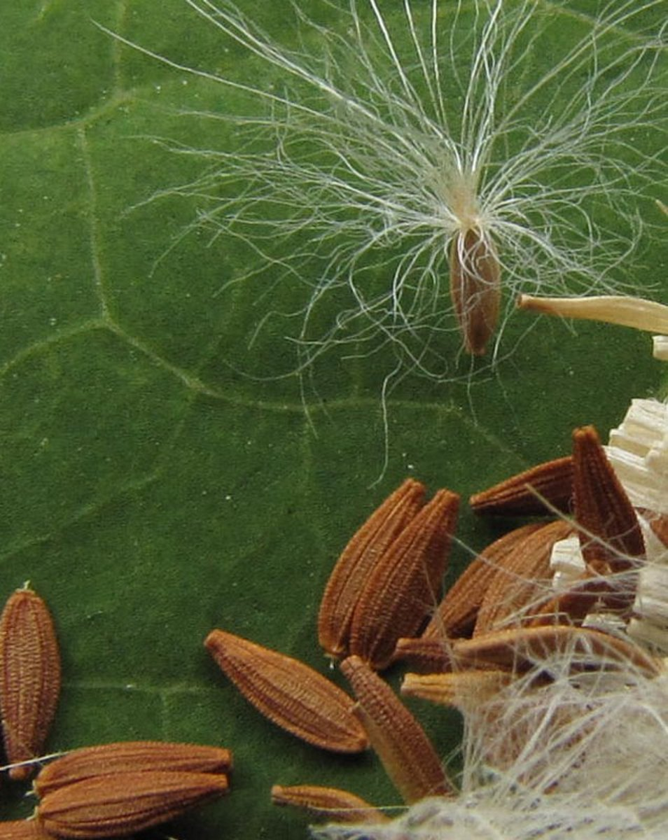 Navadna škrbinka v Ljubljani-Polju.